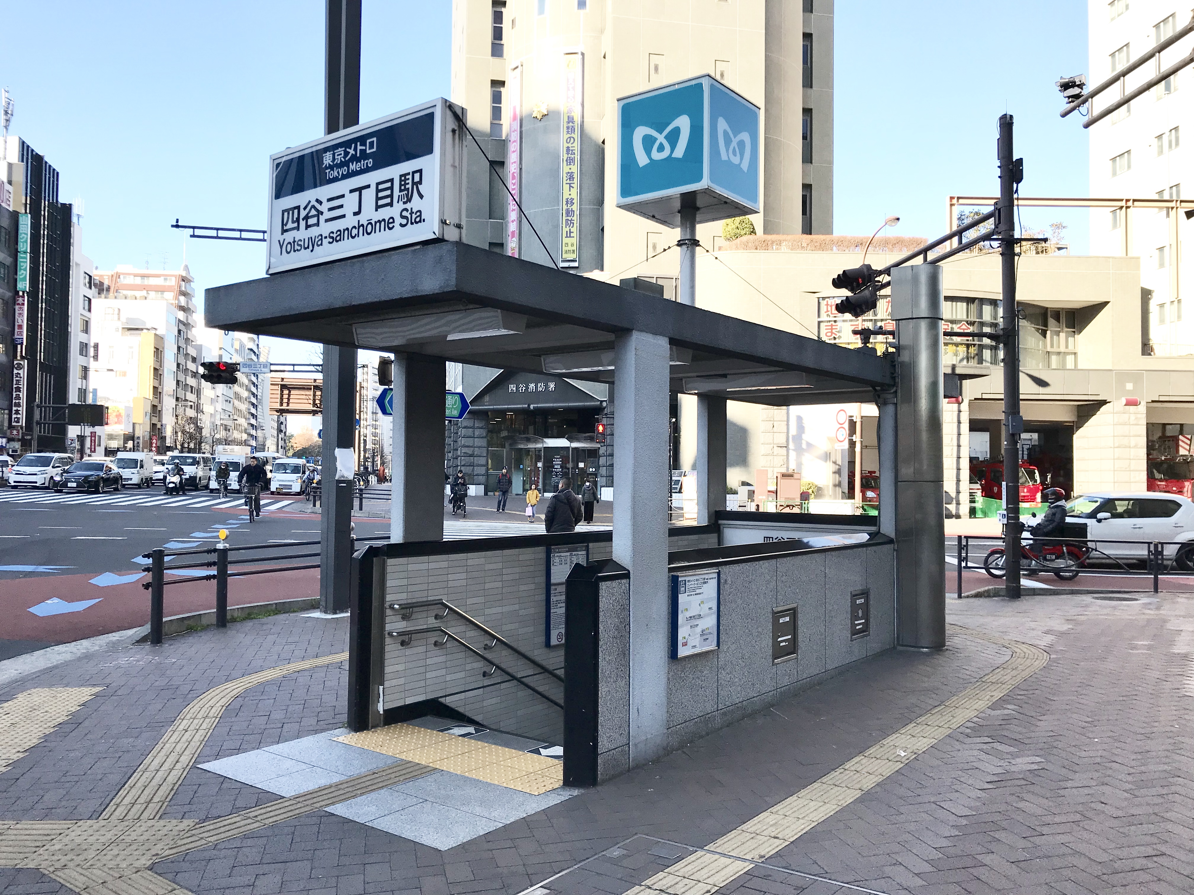 東京メトロ丸ノ内線四谷三丁目駅4番出入口